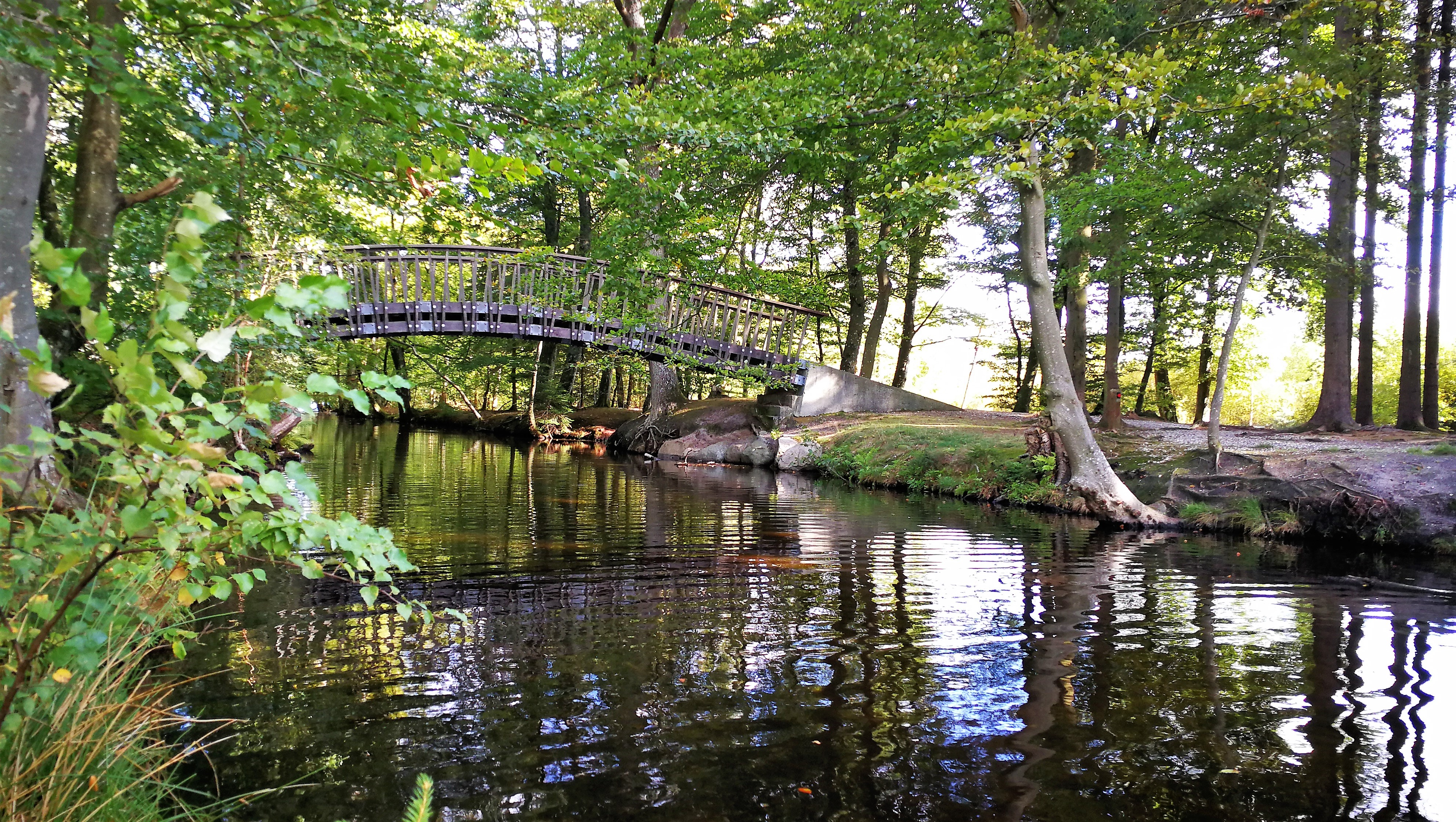 Klüwers Kanal set mod nordøst